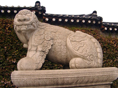 해태상